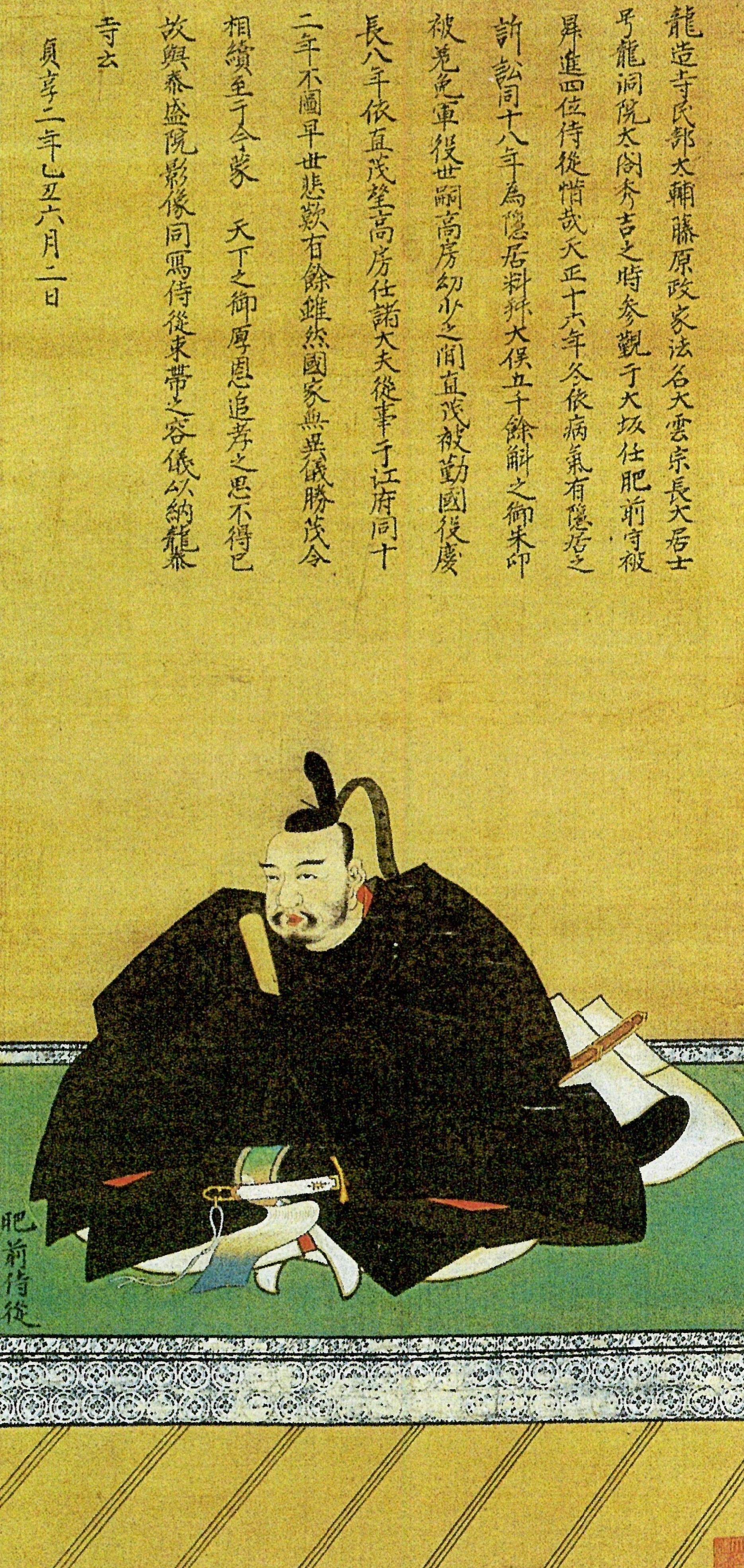 龍造寺政家の肖像。